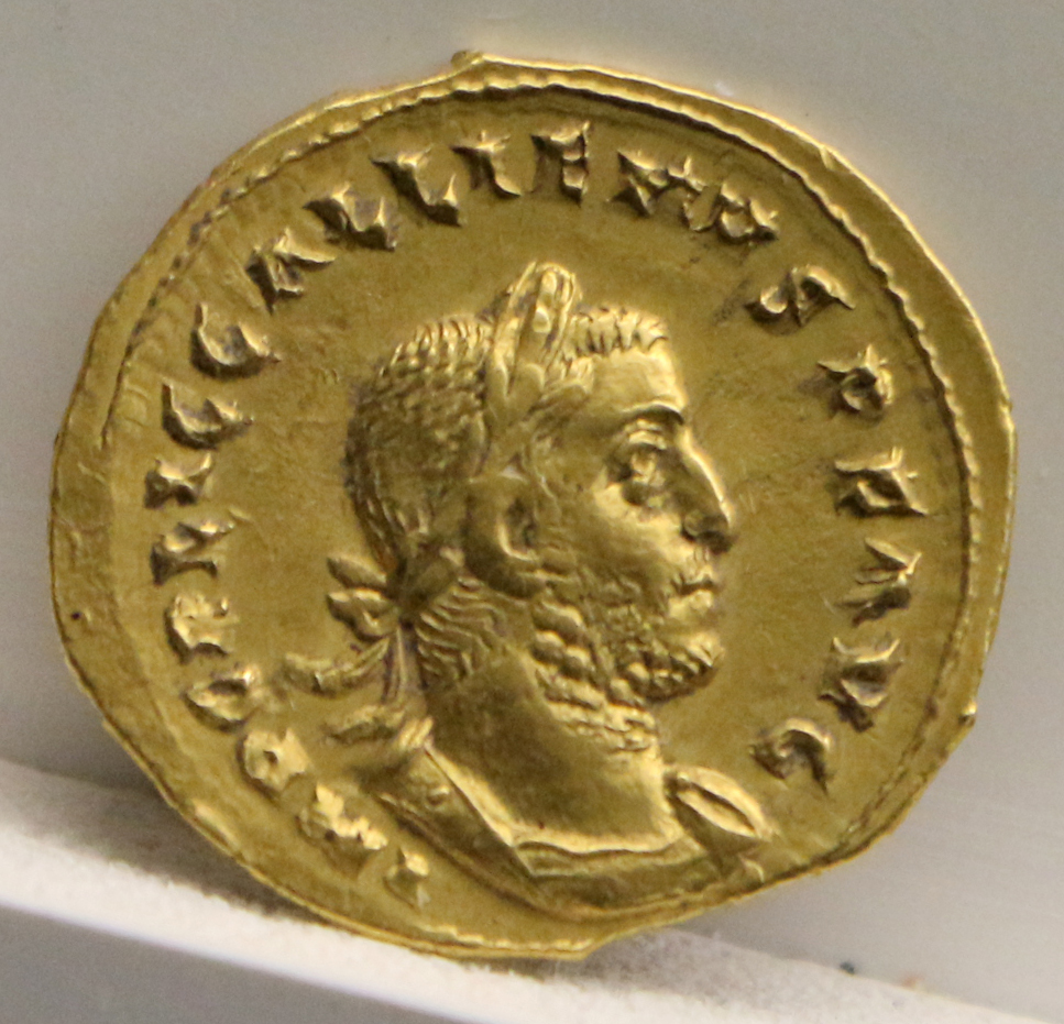 Museo Archeologico Nazionale di Aquileia This is a photo of a monument which is part of cultural heritage of Italy.